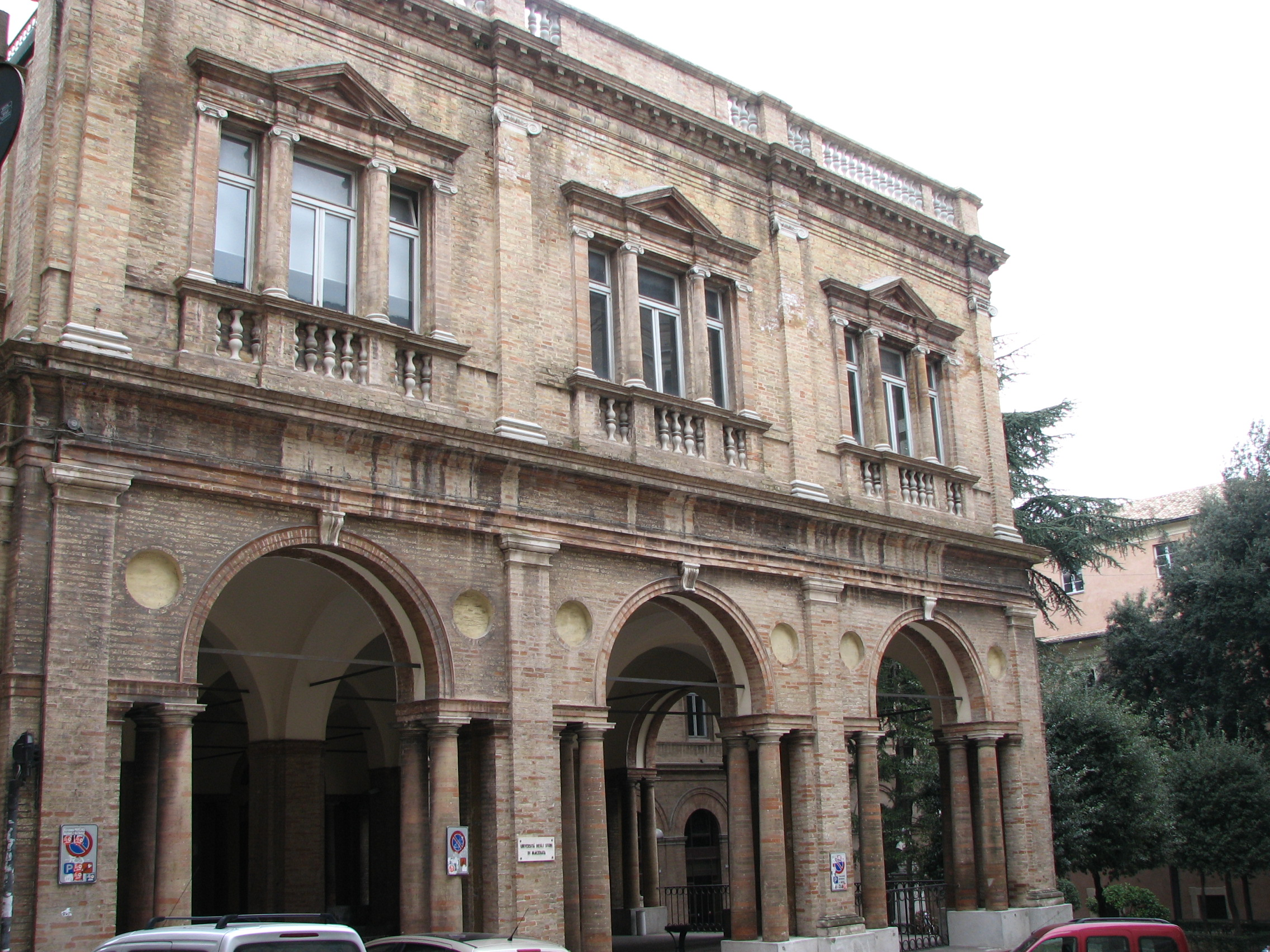 Loggia del Grano (Palazzo dell'Università), Macerata, Italy (1841)